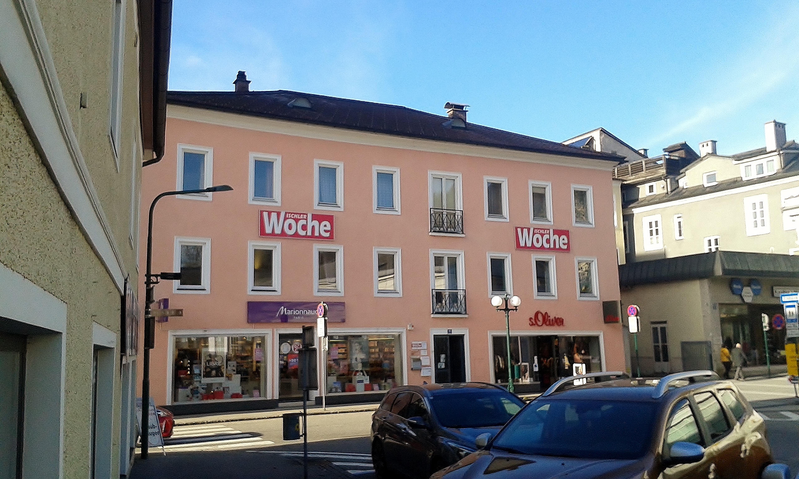 Redaktionssitz der Ischler Woche - Wochenzeitung für das Innere Salzkammergut. Gebäude Auböckplatz 13, im Zentrum von Bad Ischl